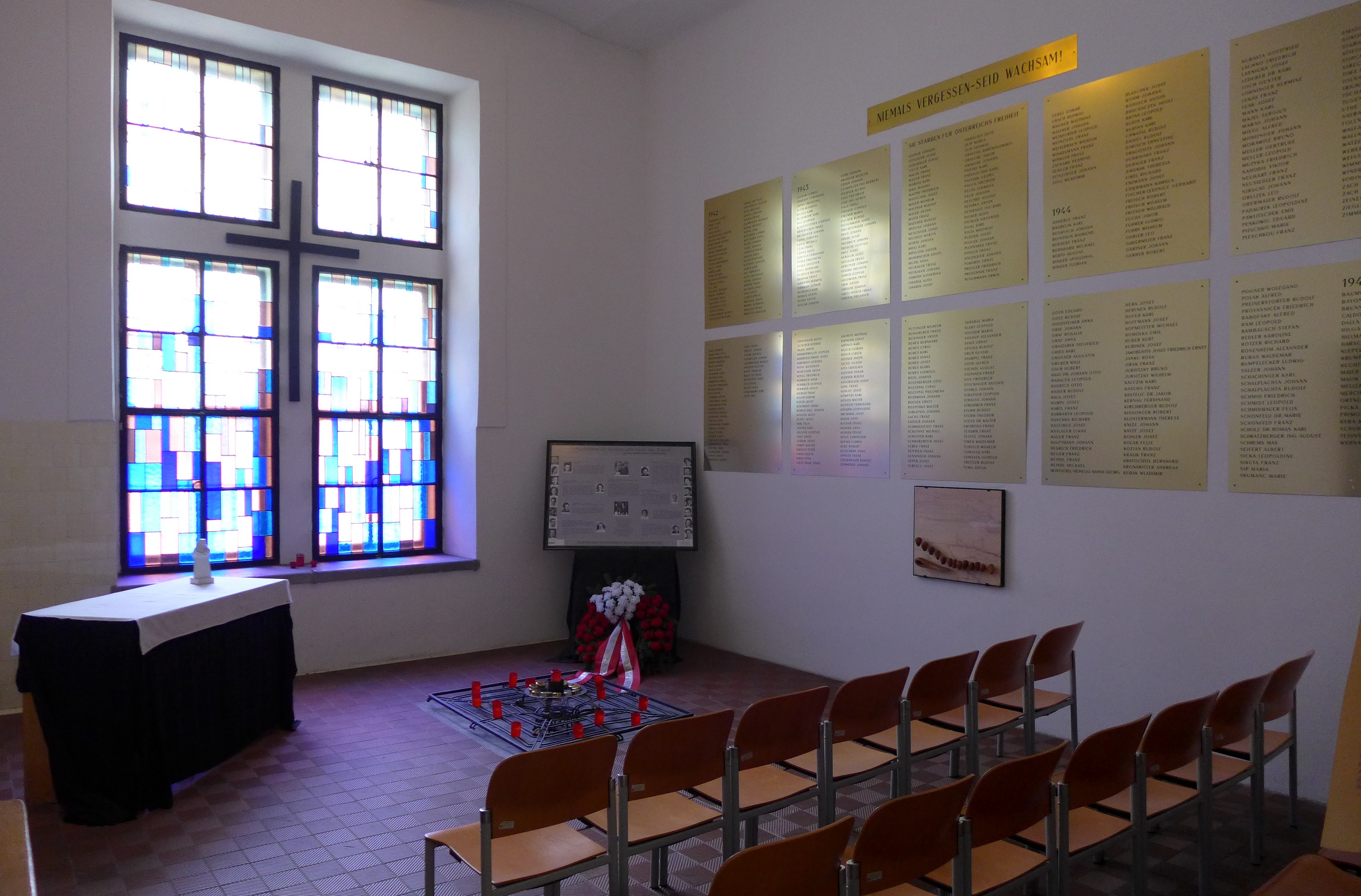 Landesgericht für Strafsachen Wien 2015, Weiheraum